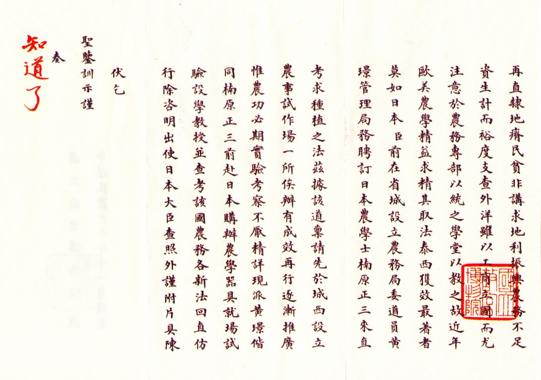 袁世凯请奏慈禧太后设立直隶农务学堂的奏折影印件